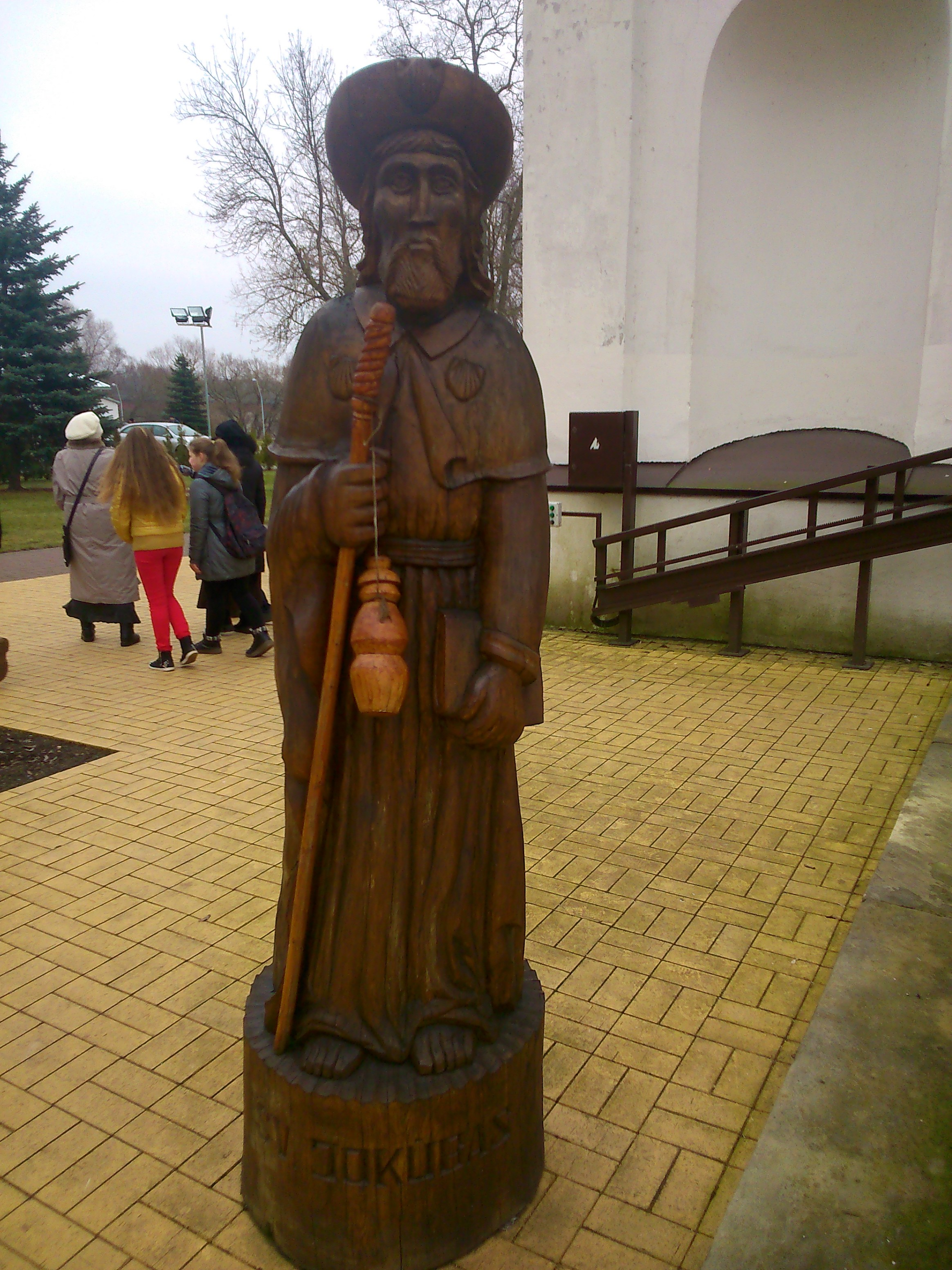 Sv. Jokūbas, Jonava